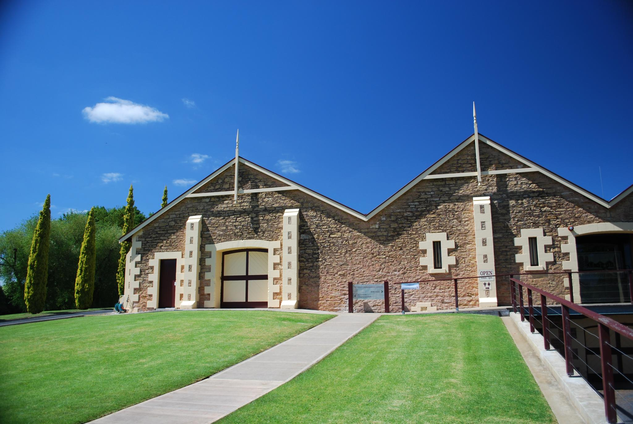 Wynns Coonawarra Cellar Door